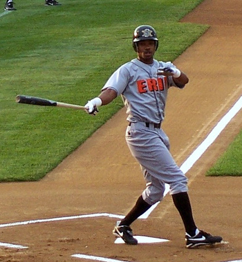 Nook Logan